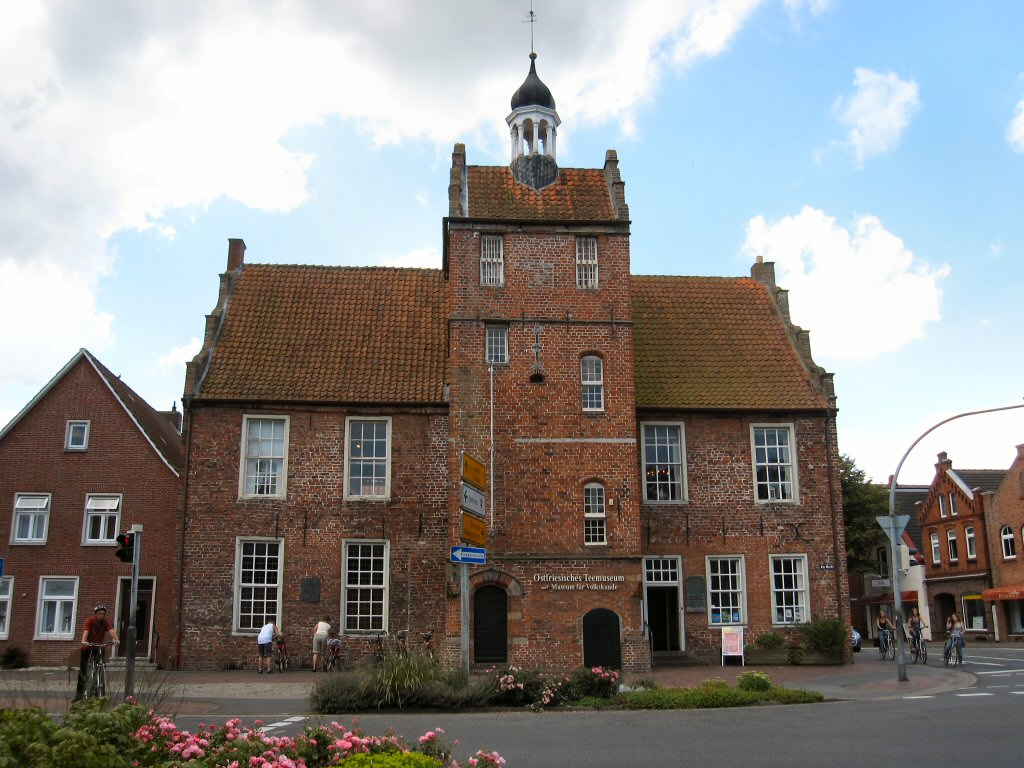 Altes Rathaus in Norden (Ostfriesland) mit dem Heimatmuseum und dem „Ostfriesischen Teemuseum“